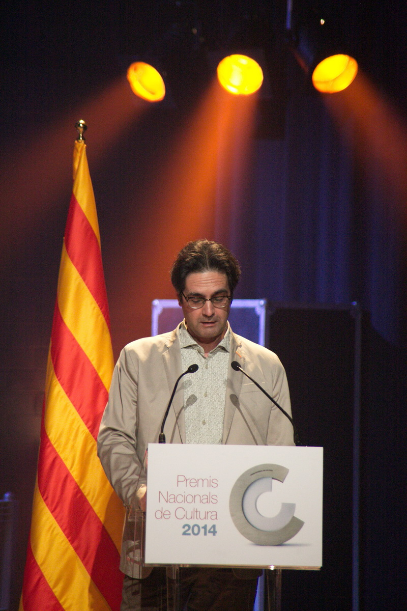 Lliurament dels Premis Nacionals de Cultura de Catalunya 2014. Santa Coloma de Gramenet, 2 de juny de 2014